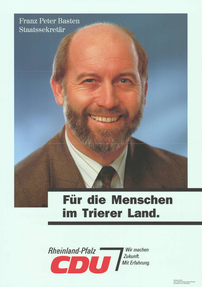 Franz Peter Basten Staatssekretär Für die Menschen im Trierer Land. Rheinland-Pfalz CDU Wir machen Zukunft. mit Erfahrung. Abbildung: Porträtfoto Plakatart: Kandidaten-/Personenplakat mit Porträt Auftraggeber: Verantw.: Rheinland-Pfalz CDU, Michael Becker, Mainz Objekt-Signatur: 10-010 : 613 Bestand: Landtagswahlplakate Rheinland-Pfalz (10-010) GliederungBestand10-18: Landtagswahlplakate Rheinland-Pfalz (10-010) » CDU Lizenz: KAS/ACDP 10-010 : 613 CC-BY-SA 3.0 DE